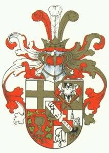 Barockes Wappen des KStV Frankonia-Straßburg in frontaler Sicht